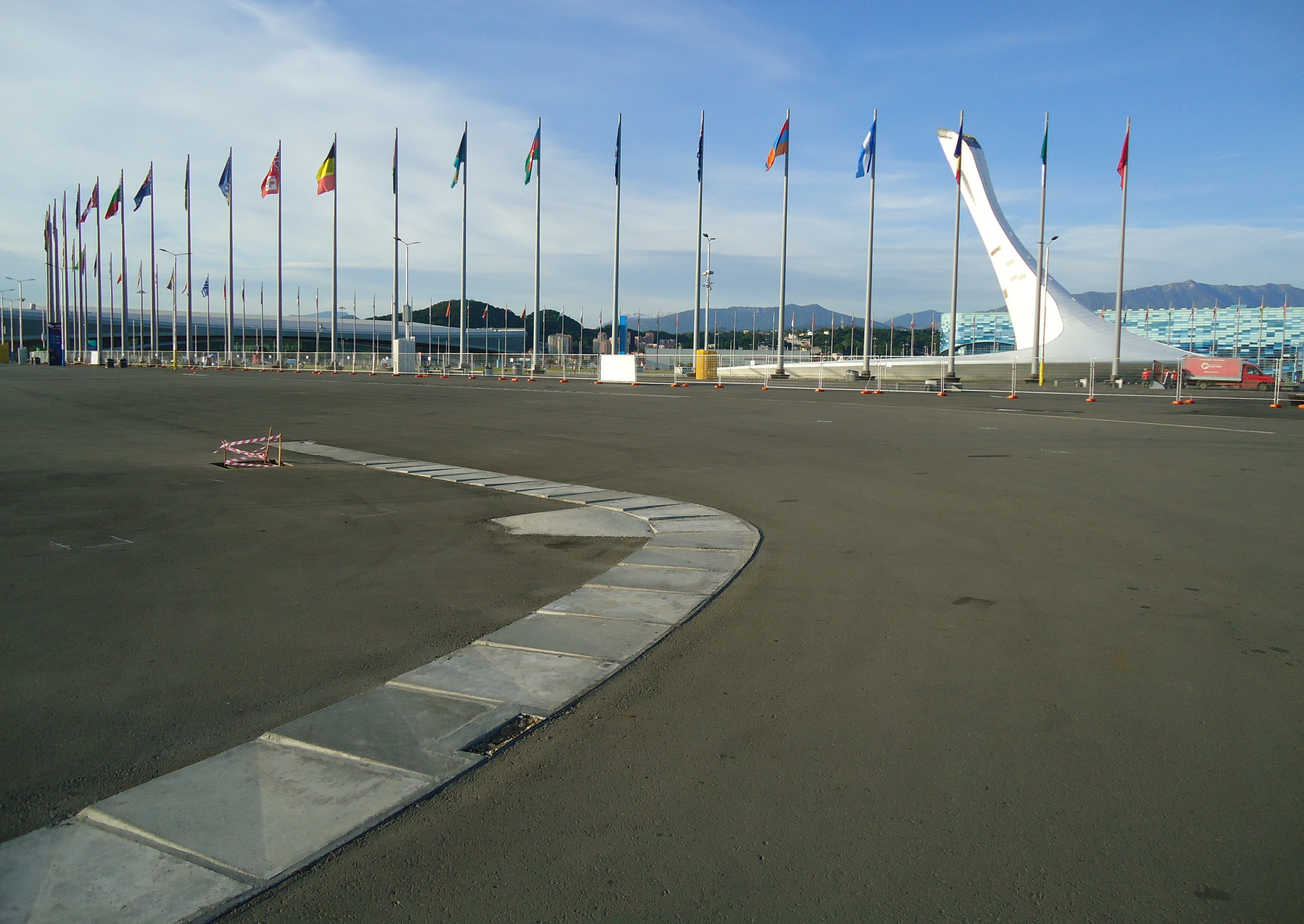 На трассе соревнований Формула1 в Олимпийском парке Сочи